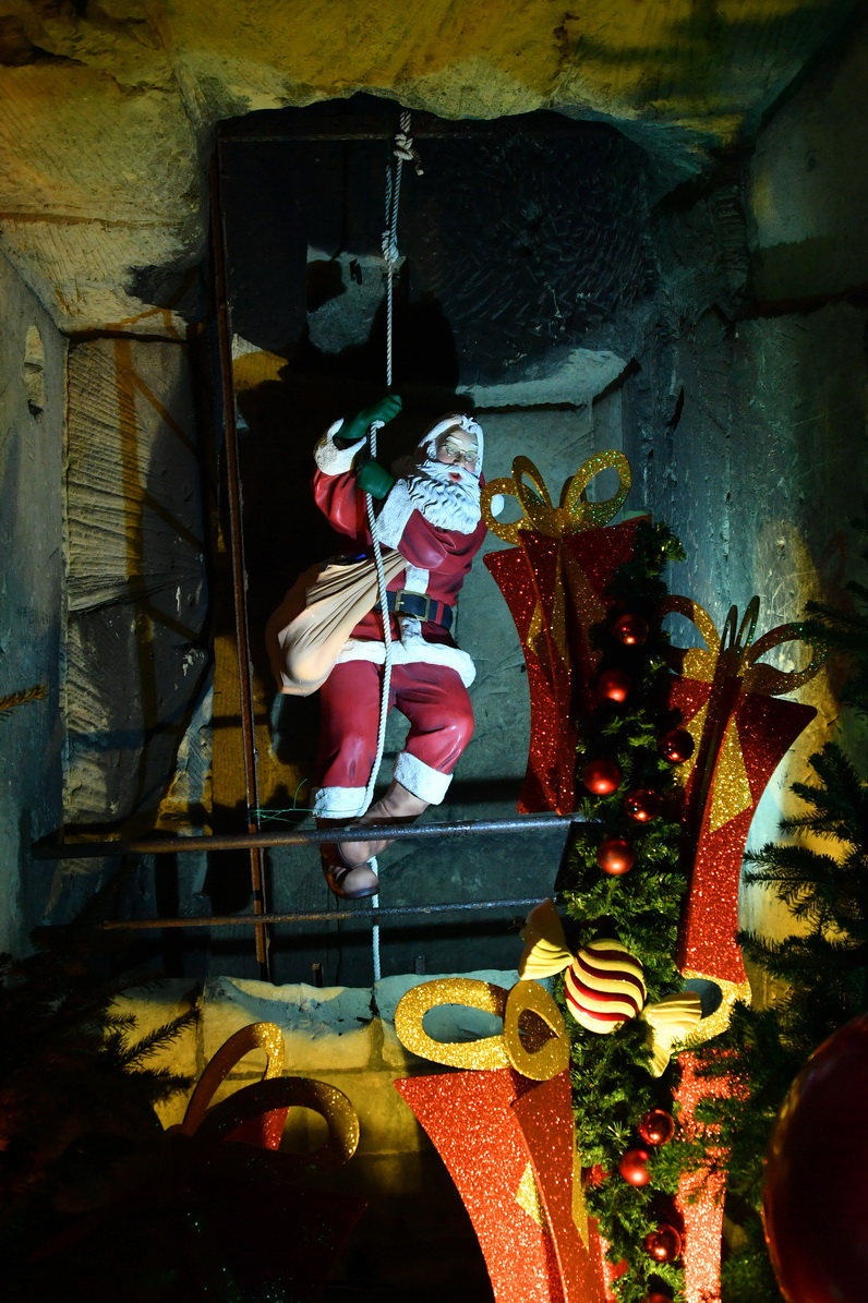 Valkenburg Fluweelengrot Kerststad